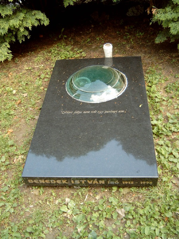 Benedek István sírja. Fekete gránitlapra elhelyezett, folyadékkal töltött üvegplasztika. Modern absztrakt. Budapesten. Farkasréti temető: 60/1-főút-6.